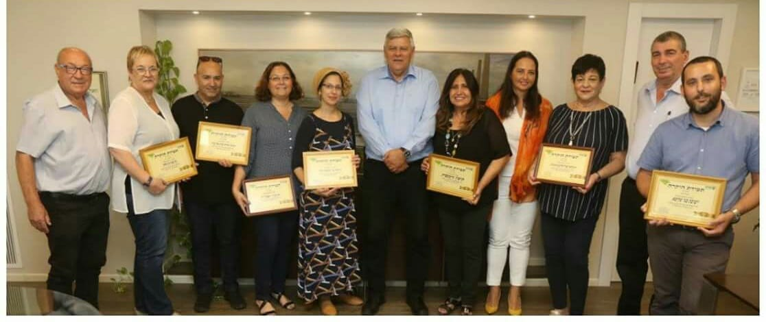 פרס הצטיינות בתחום הפדגוגי, הערכי והחברתי – לשנת תשע"ח